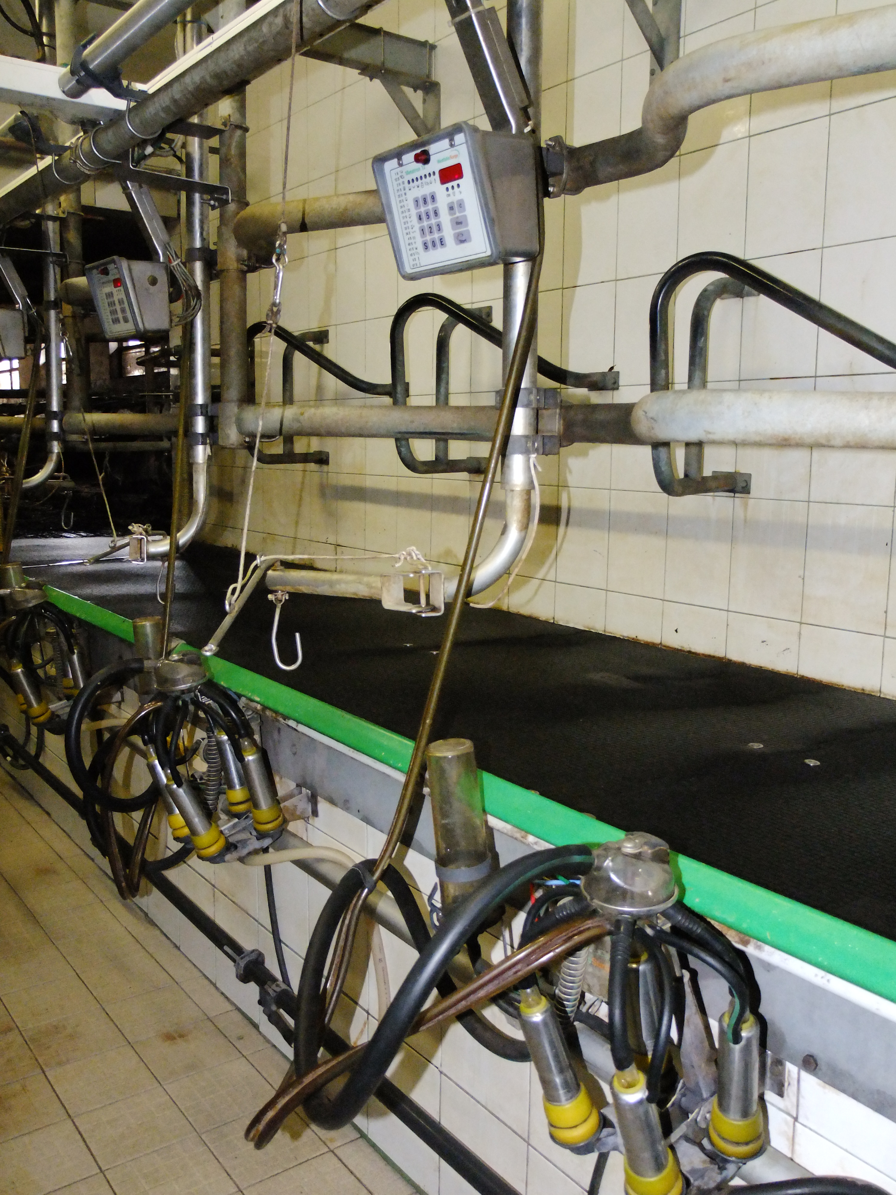 Na sliki je vidno molzišče in nekaj glavne opreme. Molzna enota, merilna enota, ogrodje, pohodna guma.